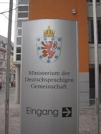 Eingangsschild zum Ministerium der Deutschsprachigen Gemeinschaft in Eupen.